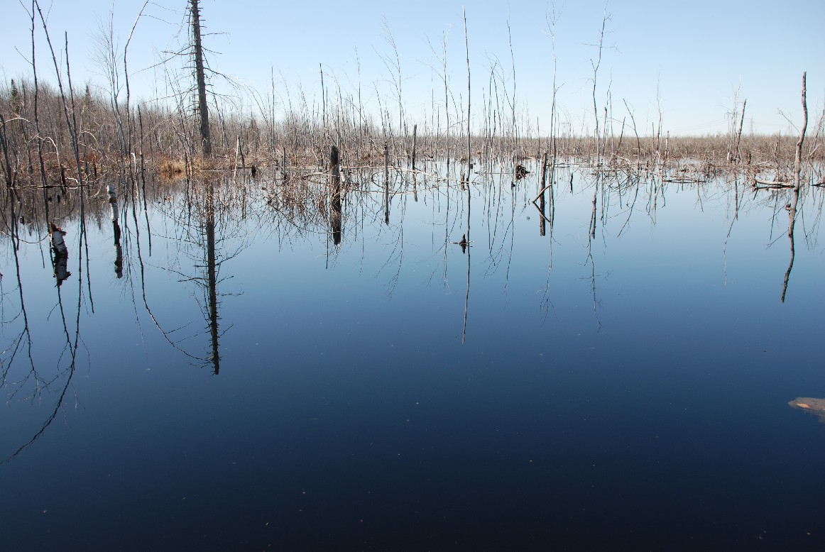 Marais site des tourbières de terrebonne